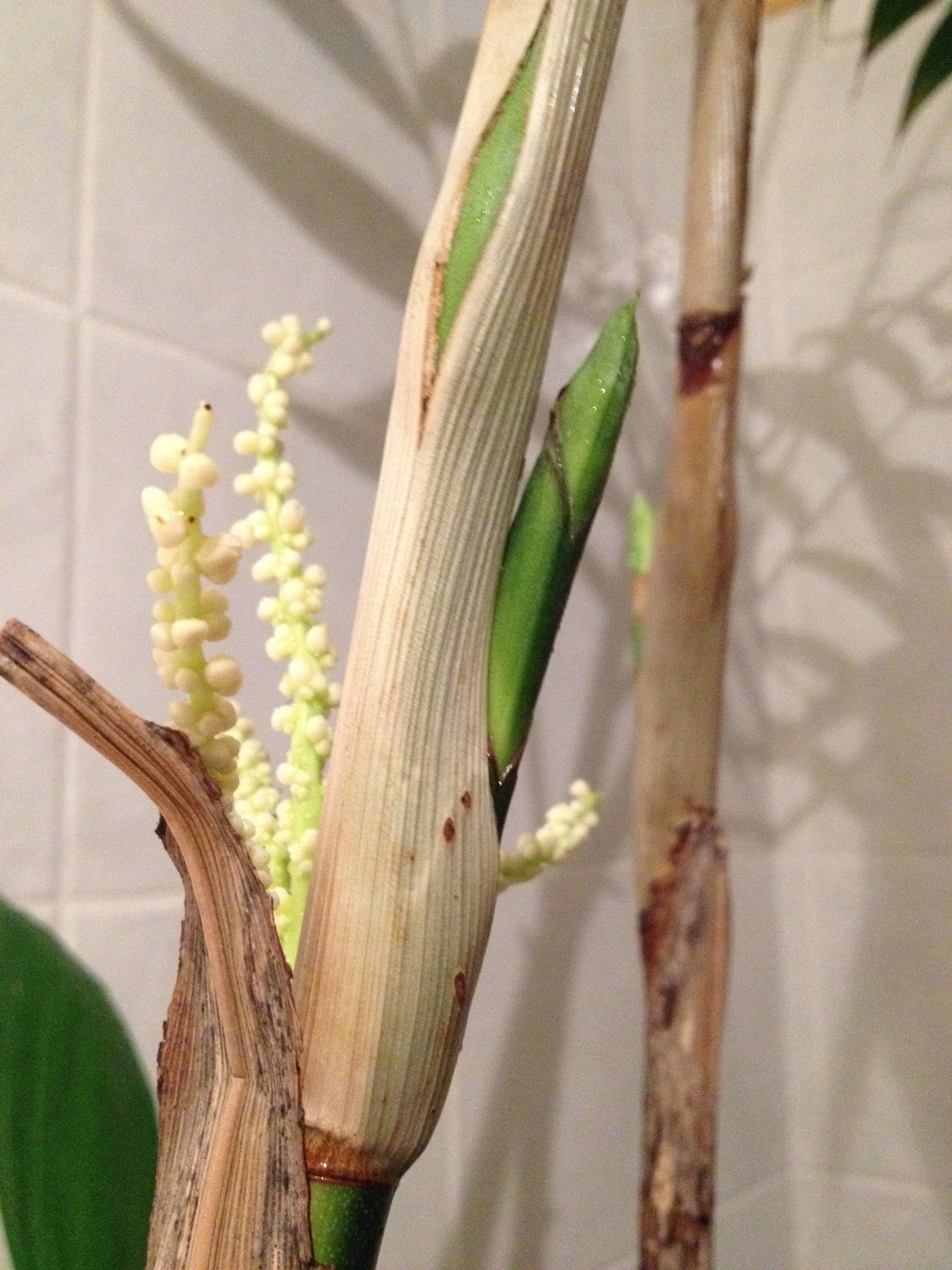 Chamaedorea microspadix - début de sortie de la bractée entourant l'inflorescence.